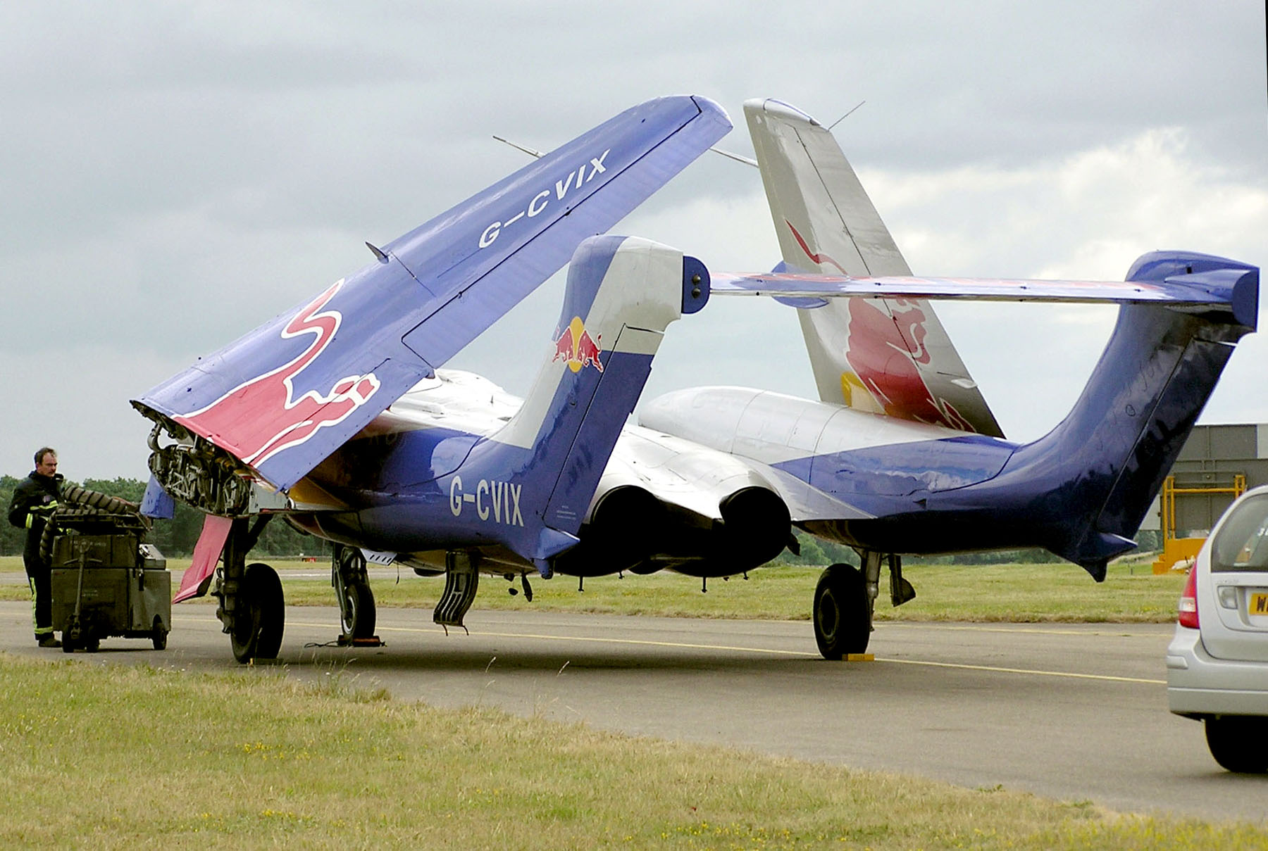 Un De Havilland Sea Vixen (G-CVIX), en un show aéreo en 2005 de Havilland dH-110 Sea Vixen D3, formerly of the Royal Navy as XP924, now on the UK Civil Register as G-CVIX. With wings folded, at Kemble Airfield, Gloucestershire, England. The aircraft is in Red Bull advertising markings. XP924 entered service with the Royal Navy in 1964 as an FAW.2 model. It ended its flying in 1991 as a trainer for teaching pilots to fly aircraft by remote control from the ground (for use as missile targets). Photographed by Adrian Pingstone in June 2004 and released to the public domain.